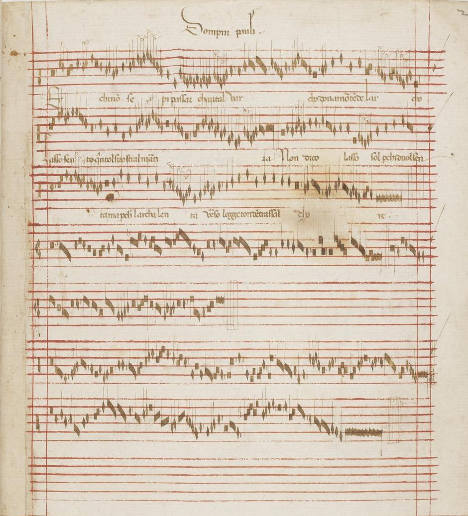 Codex Reina